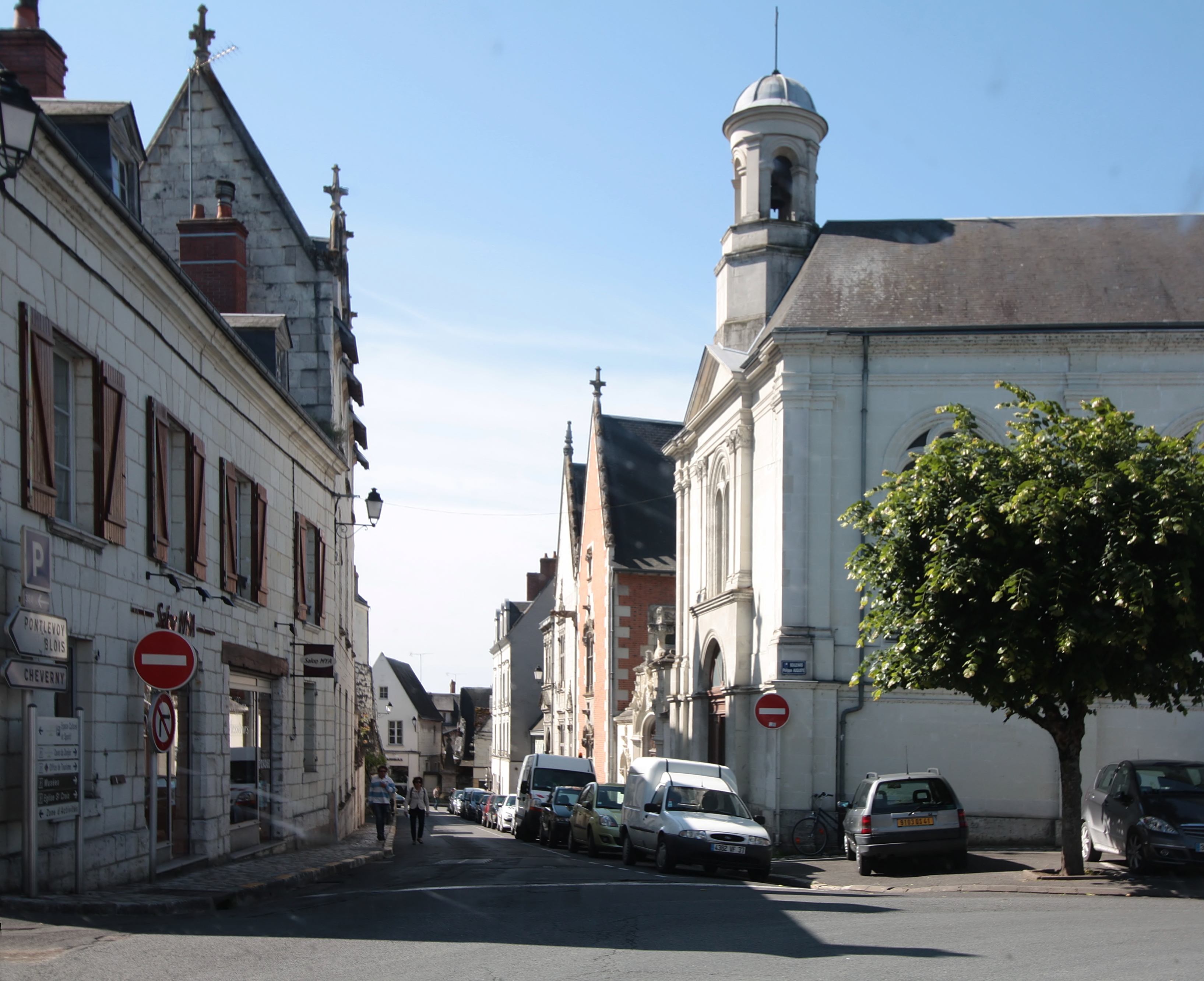 Burgruine Montrichard im Département in Loir-et-Cher/Frankreich - Blick in die Rue Porte aux Rois im Stadtzentrum.